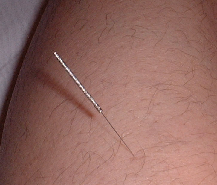 ステンレス鍼 1寸1番鍼にて足三里（前脛骨筋）に刺入。 被術者、撮影者の許可を得ました。